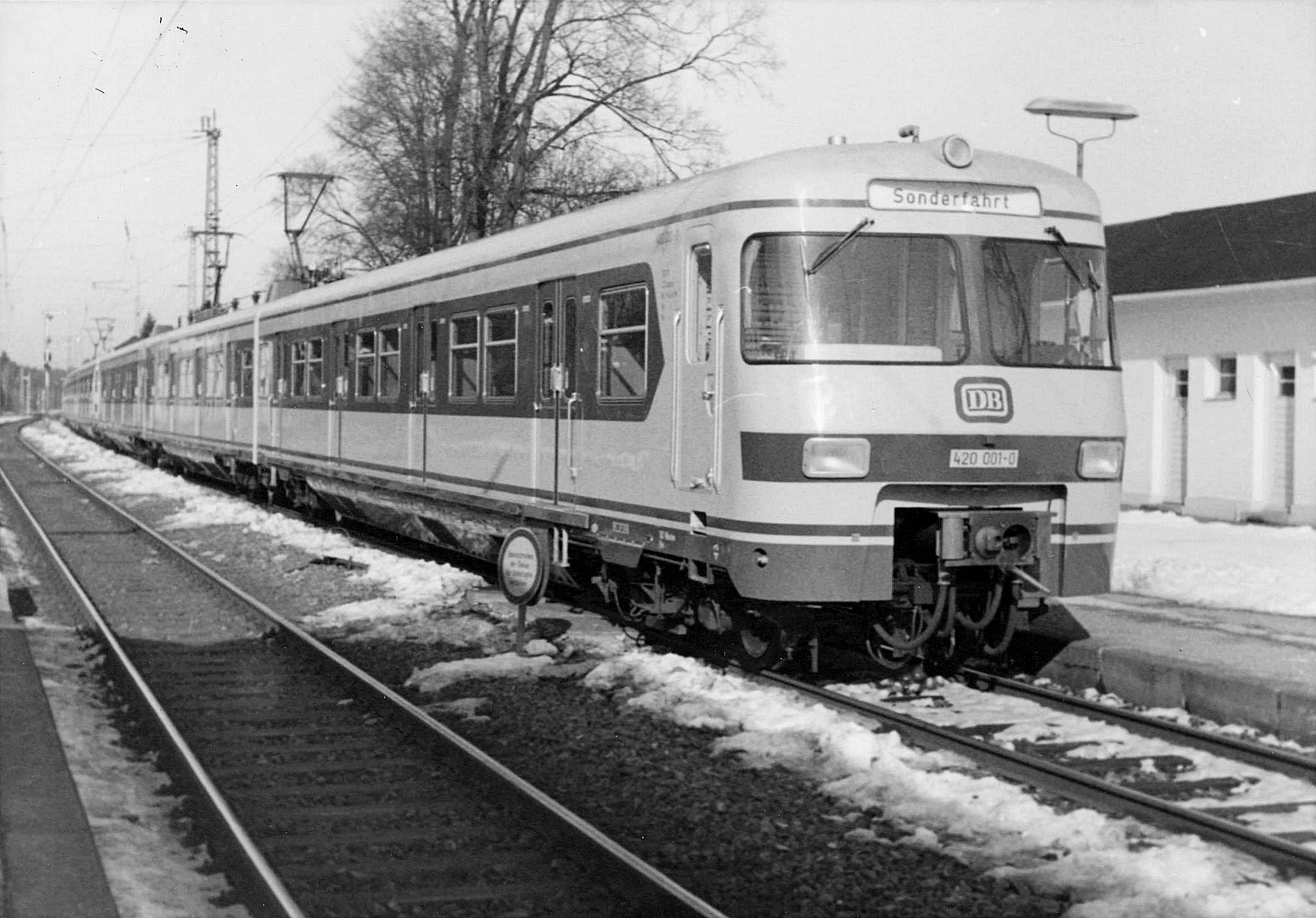 Vorserien-Elektrotriebzug 420 001 nach Testfahrten zwischen München-Pasing und Gauting im Bahnhof Gauting (ehem. Gleis 1) im Jahr 1970